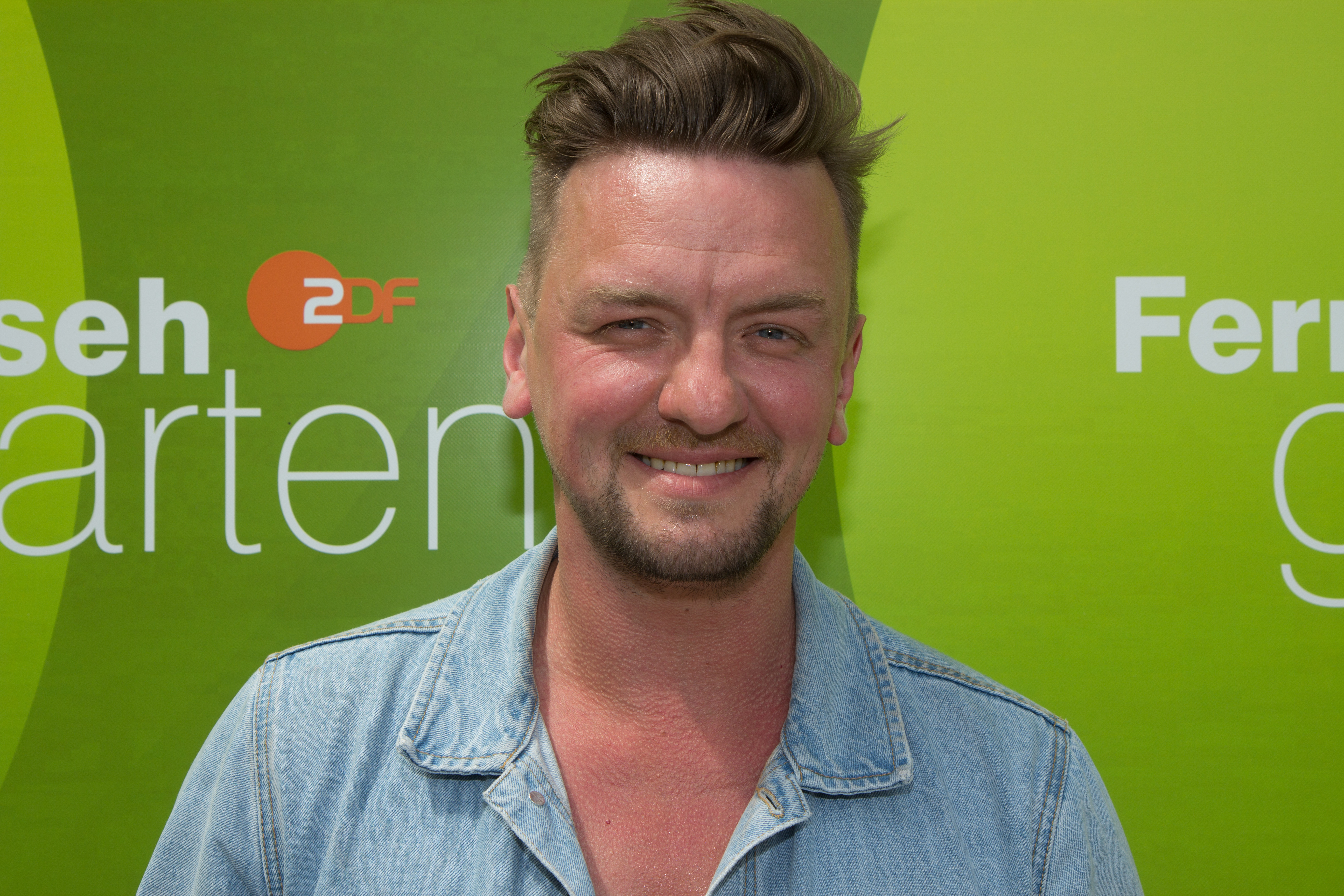 Ben Zucker als Gast beim ZDF-Fernsehgarten am 27. Mai 2018 in Mainz.